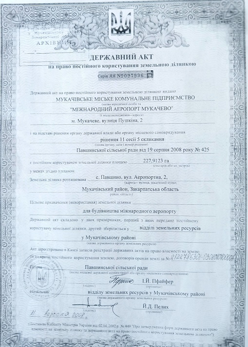 Акт на землю